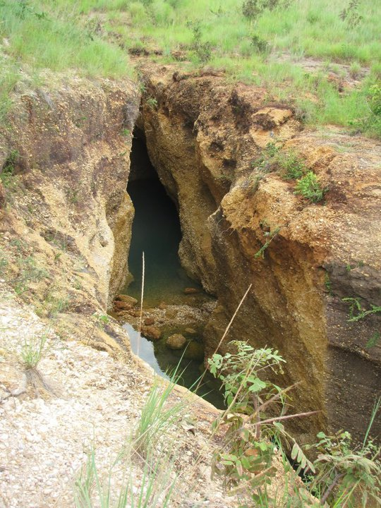 Parque nacional Aguaro-Guariquito, estado Guárico - Venezuela (2009)